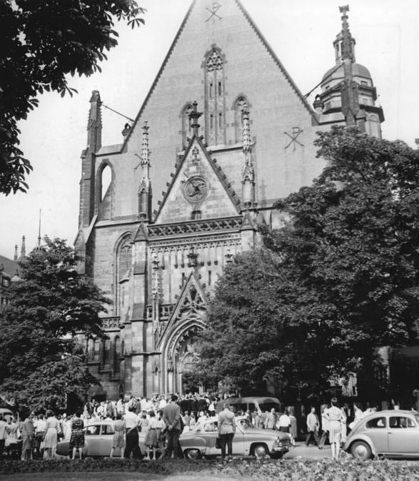 Leipzig, Thomaskirche Zentralbild Koch Ne-ga. 24.6.62 38. Deutsches Bachfest in Leipzig Am 23. Juni 1962 fand in der restaurierten Thomas-Kirche in Leipzig eine Motette des Thomanerchores unter Leitung von Thomaskantor Prof. Erhard Mauersberger statt. UBz: Blick auf die Thomaskirche vor der Veranstaltung.